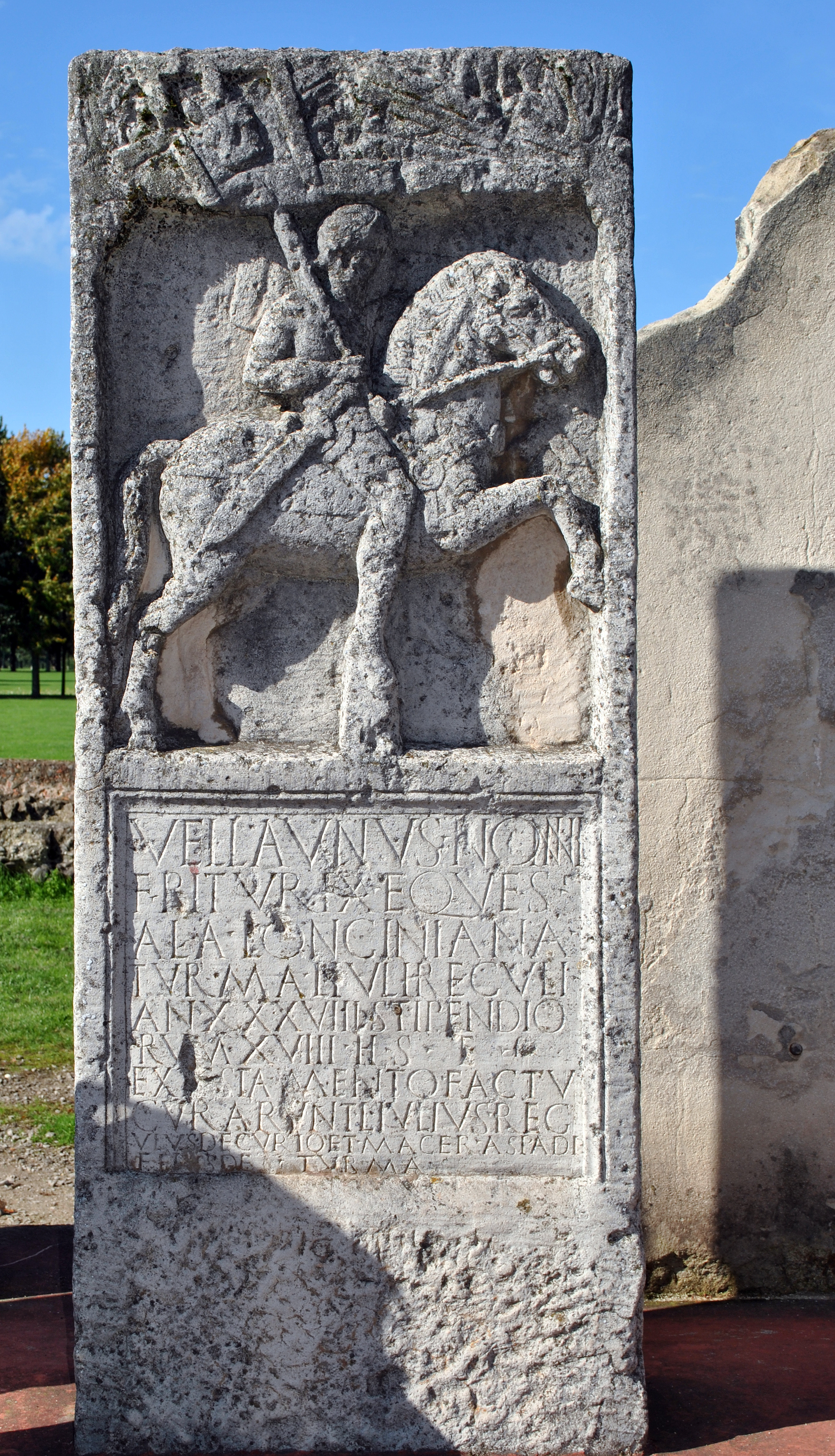 CIL XIII, 08094; Grabmal des Vellaunus, Reiter der Ala Longiniana; Bonn, Kopie im Archäologischen Park Xanten